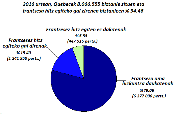 2016 urtean Quebecen frantsesa hitz egiteko gai direnak